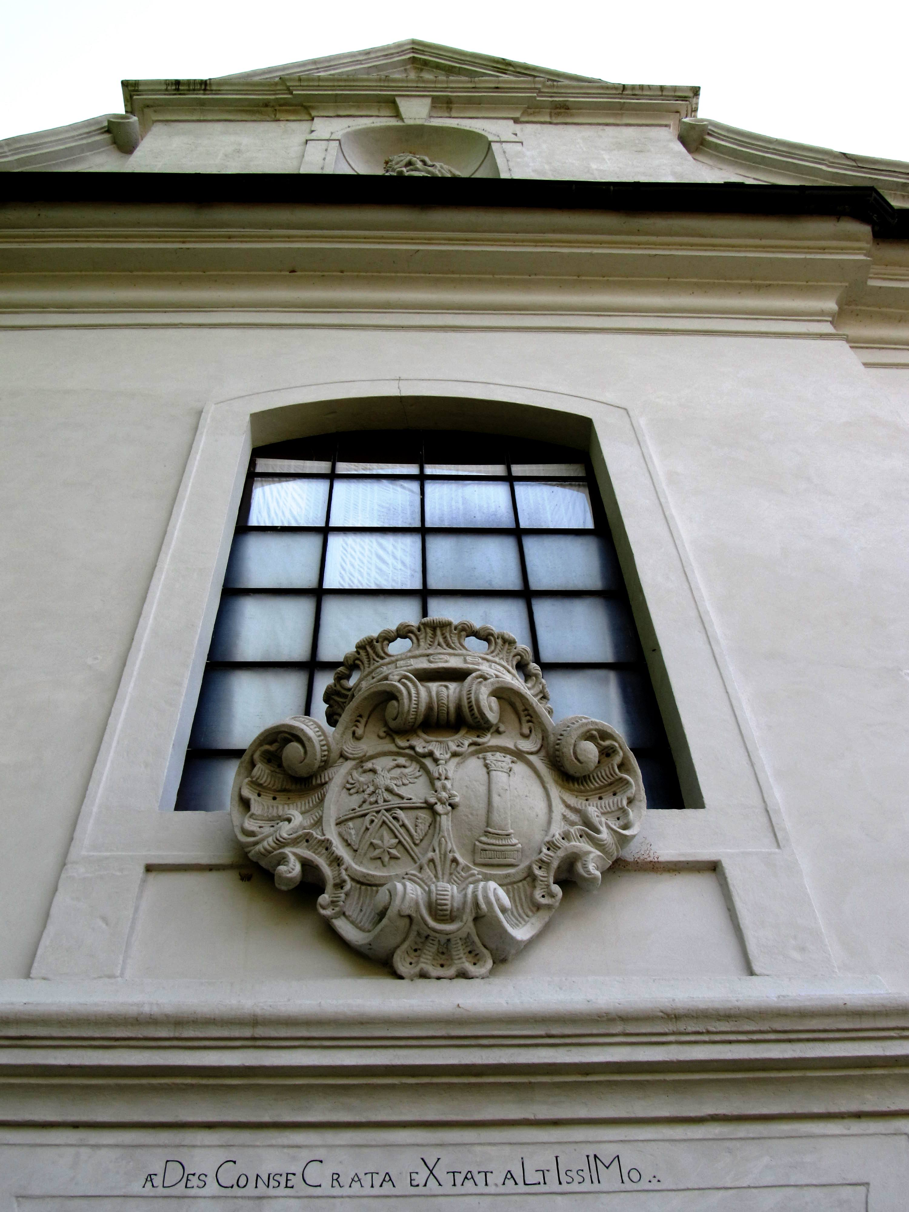 Kostel sv. Jakuba Většího, erb Desfoursů a Colonnů